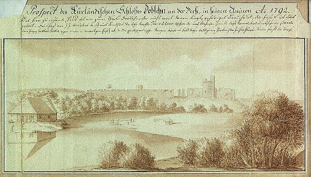 Dobeles pilsdrupas 1792. gadā (Broces kolekcija).